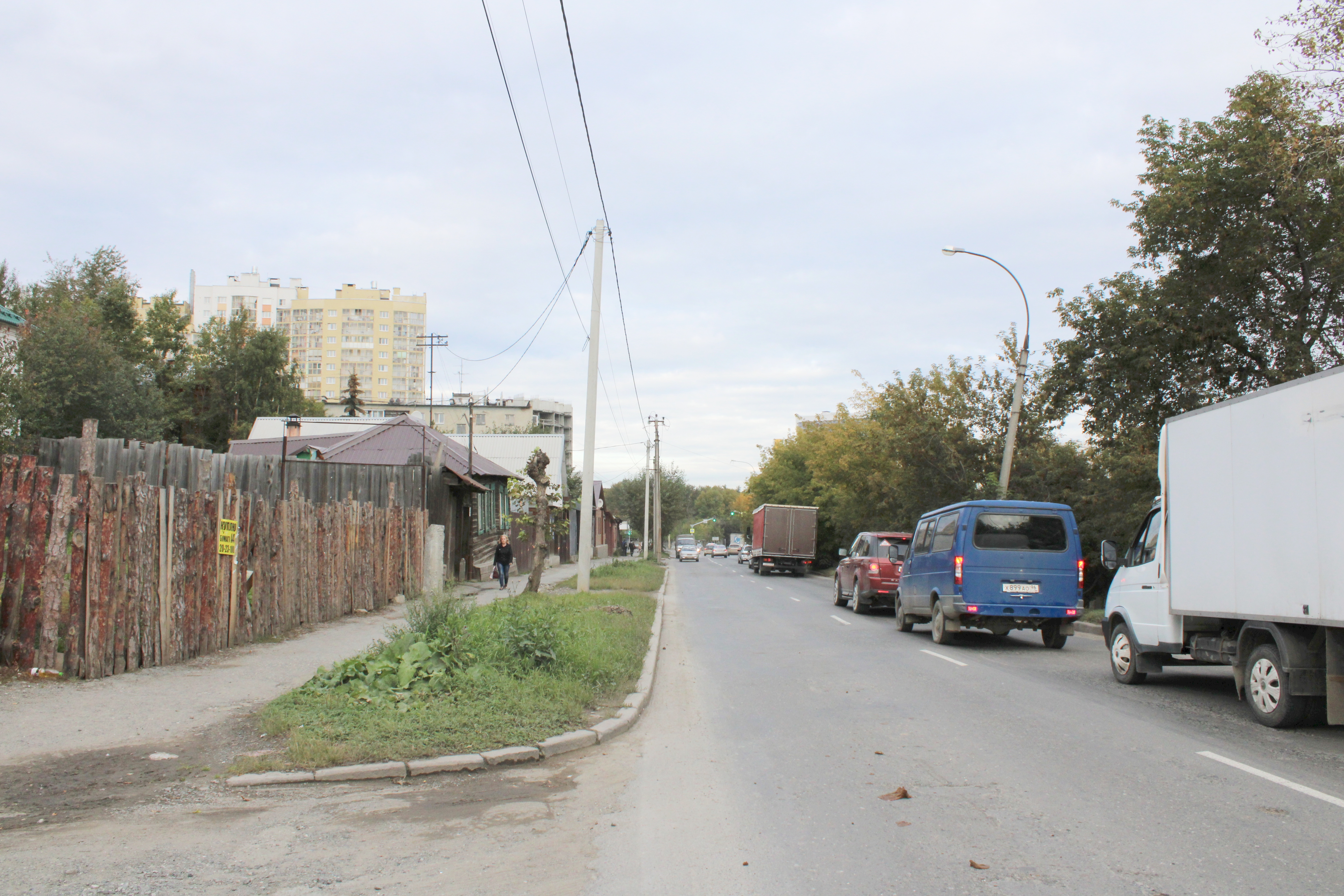 Улица Лыжников с запада на восток. На заднем плане — перекрёсток с улицей Щербакова